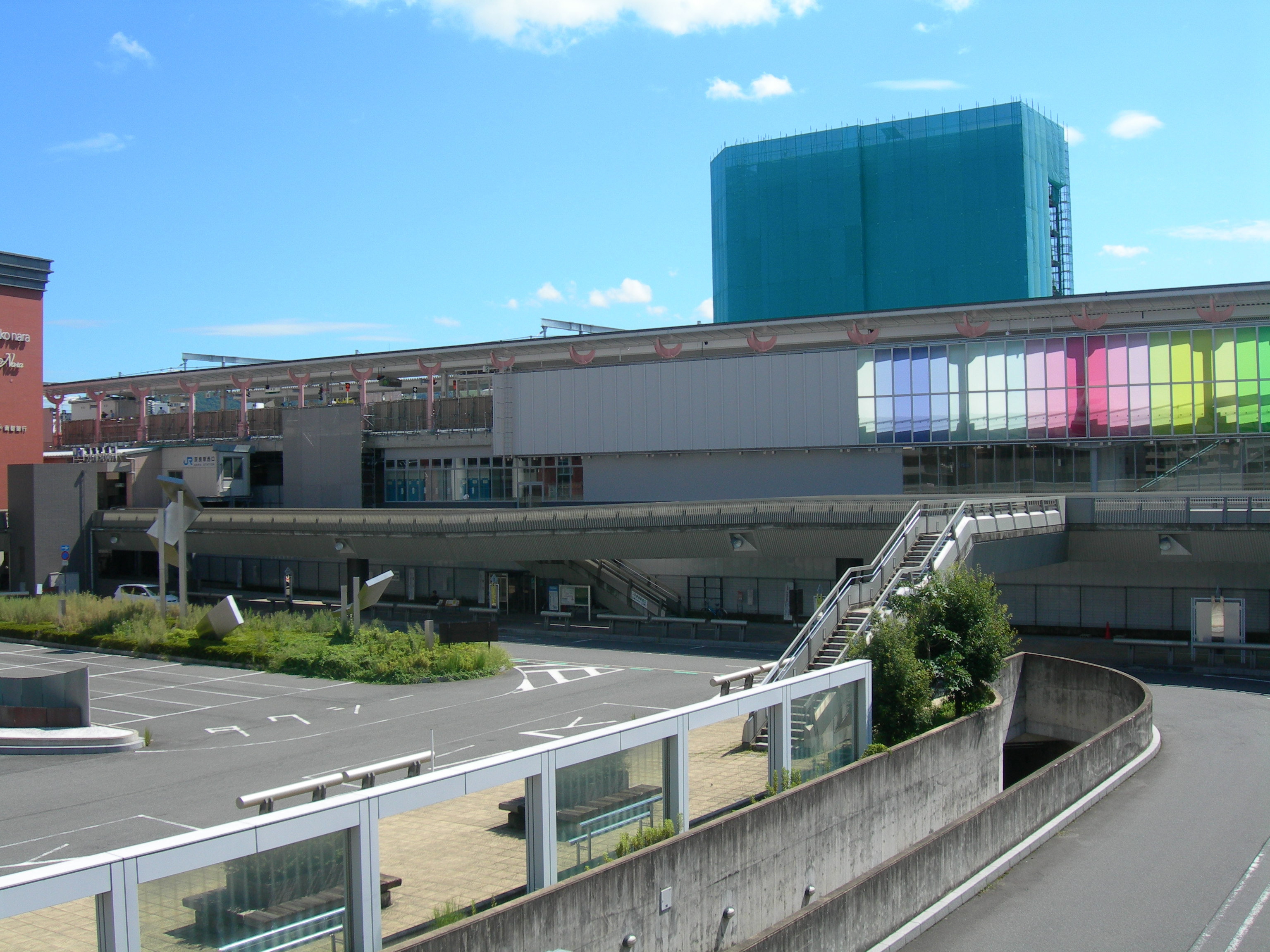 奈良駅西口